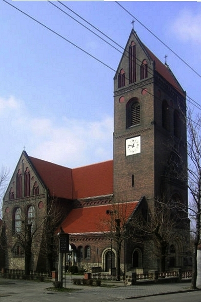 Kosciol Matki Bozej Rozancowej w Swietochlowicach